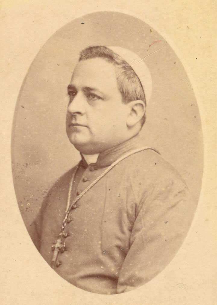 Mons. Bernardo Herrera Restrepo, Obispo de Medellín (1886-1891) y Arzobispo de Bogotá.